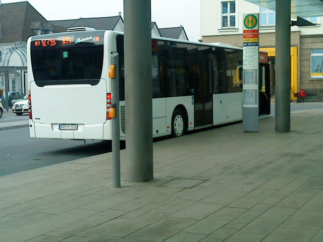 Wagen 50 der VKU und der Verkehrsgesellschaft Breitenbach in Hamm, Bahnhof